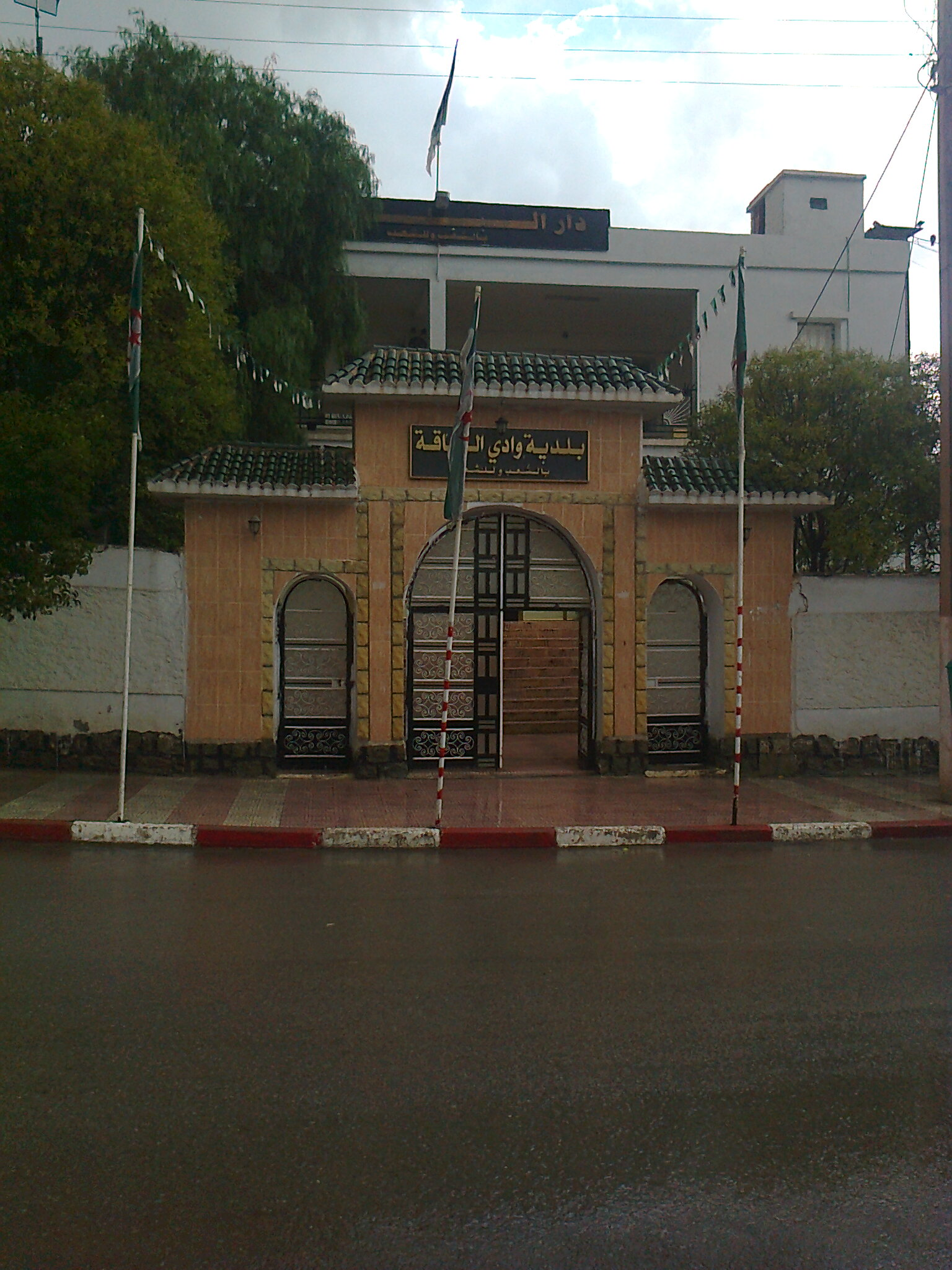 Commune Oued Taga